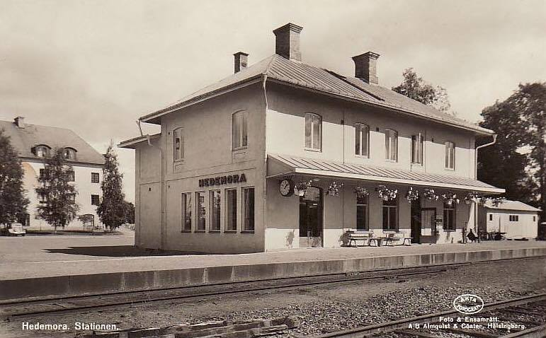 Vykort från Hedemora järnvägsstation